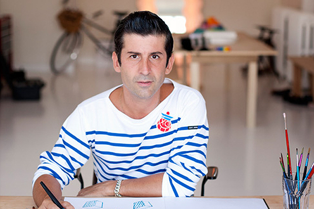 Porträt André Saraiva